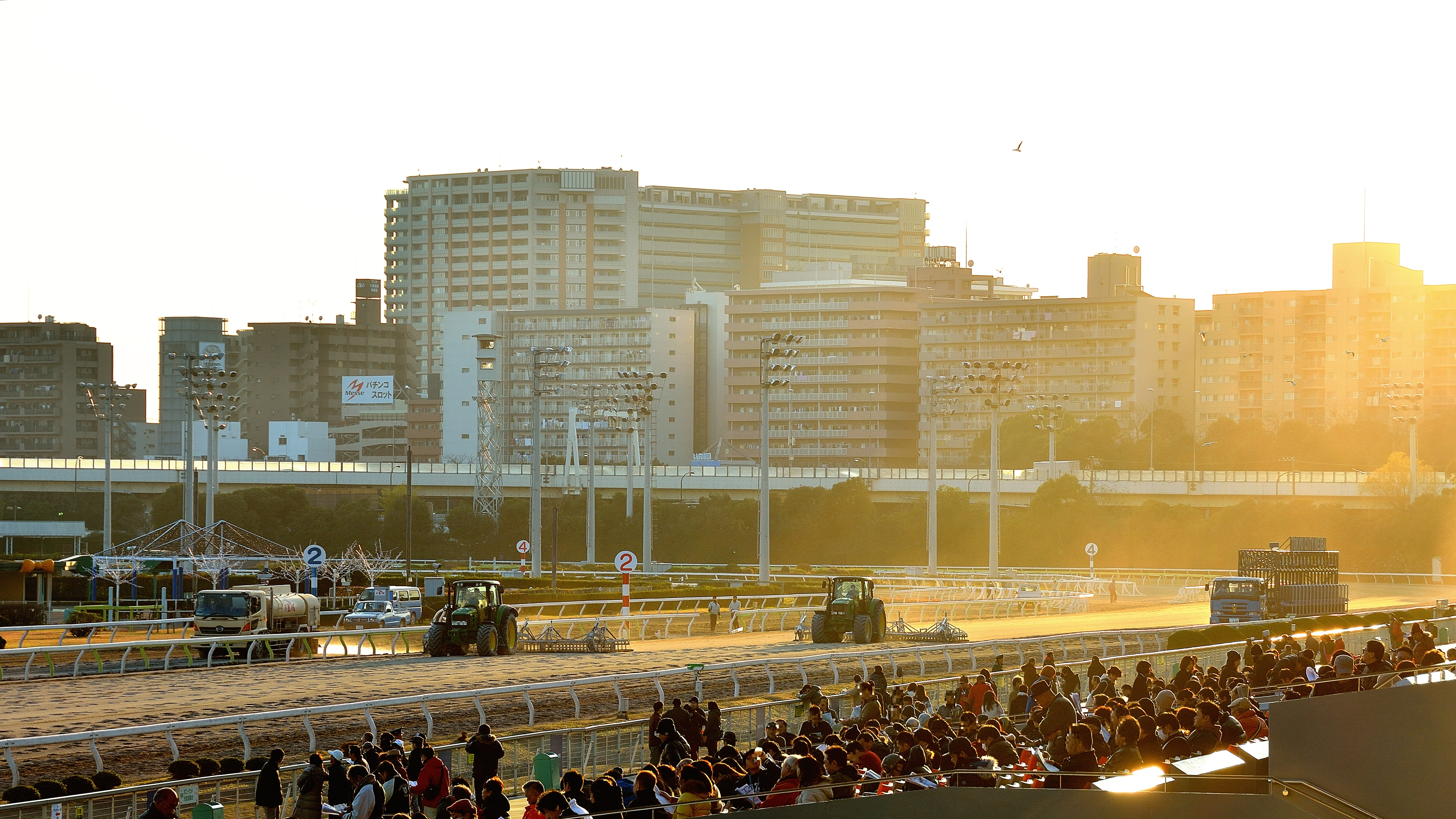 2015年12月31日に大井競馬場で、場内整備の風景と、思い思いに過ごしている観客風景を撮影したもの。プライバシー保護のため、一部モザイク加工を施しています。